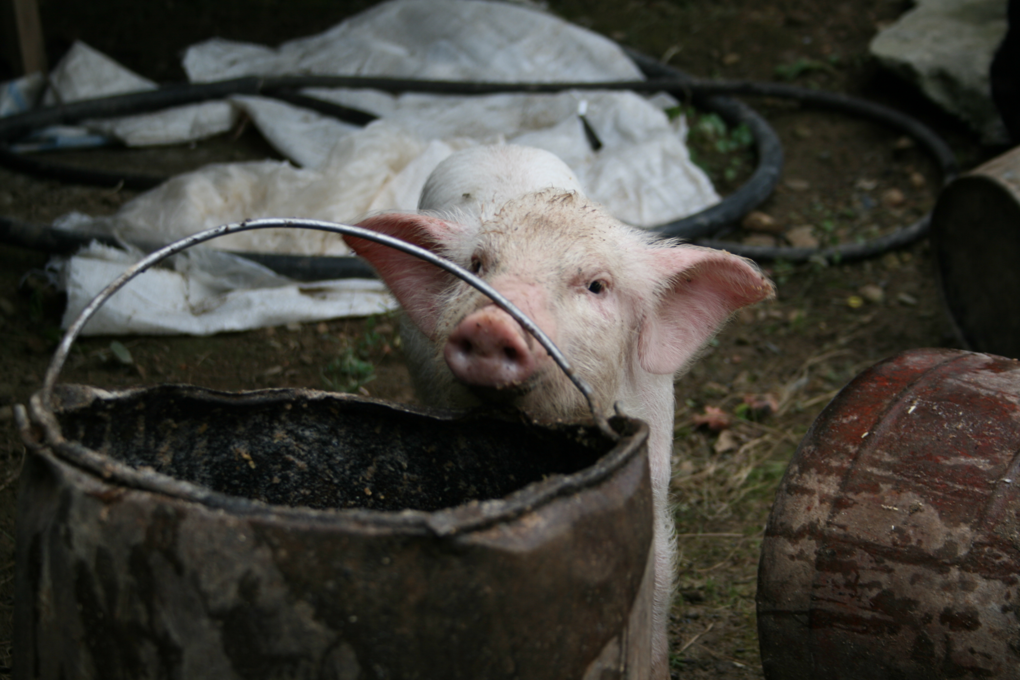 Taken at Sighnaghi, Georgia.